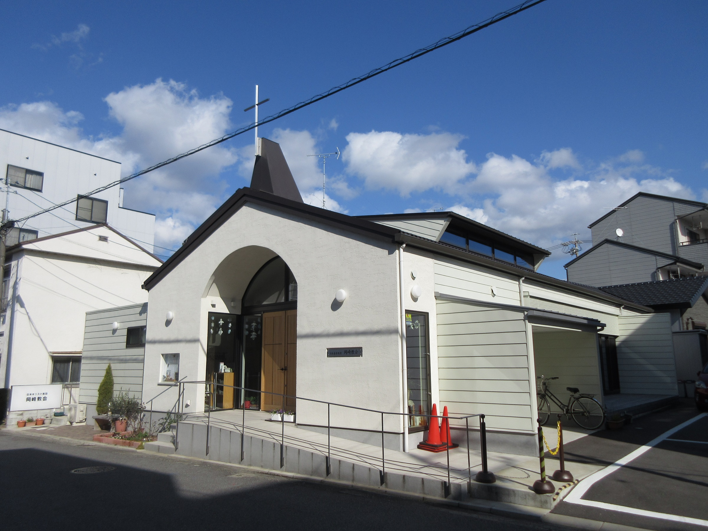 日本基督教団岡崎教会（愛知県岡崎市）